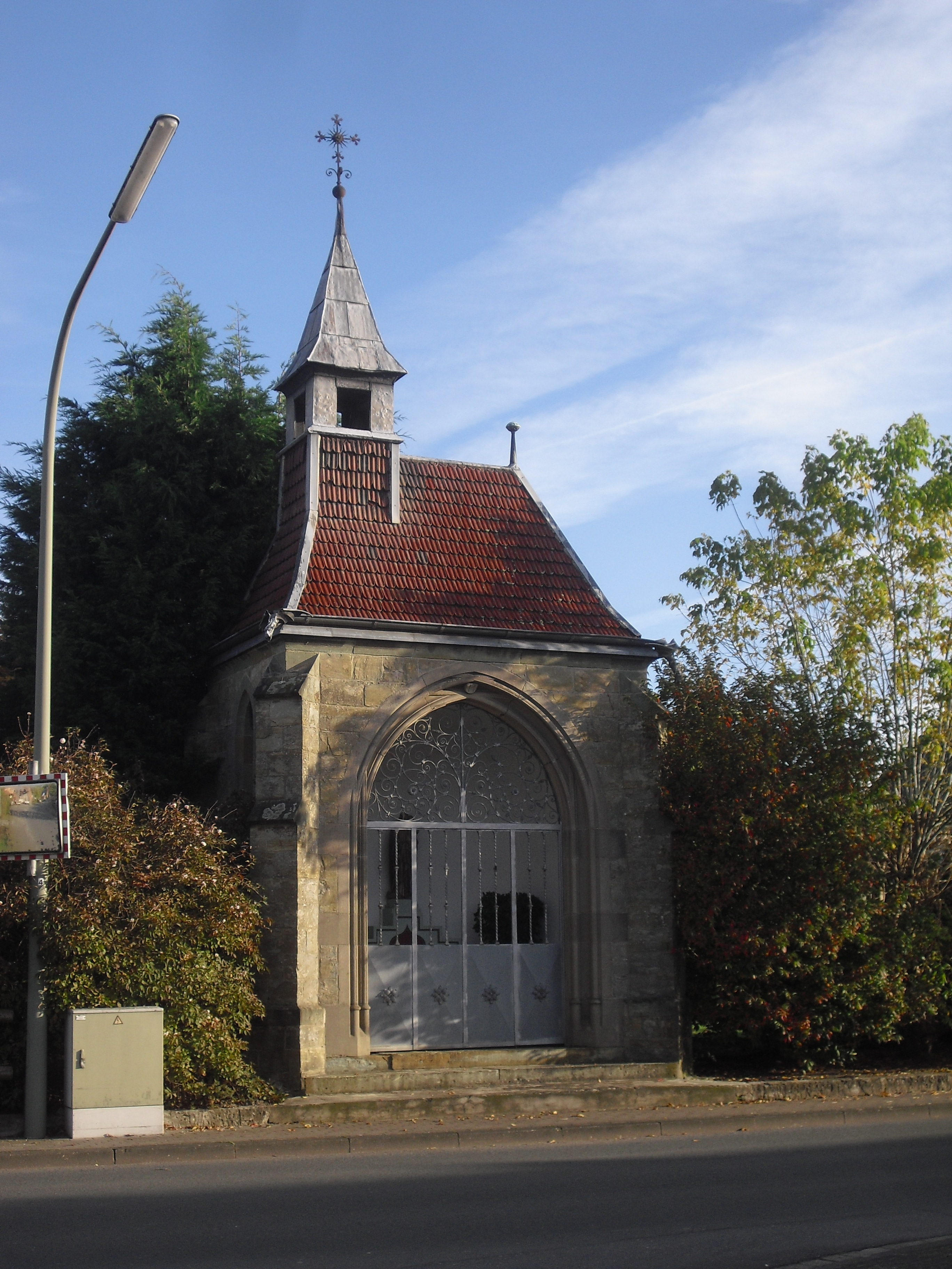 Wegekapelle Eschenstraße/Schäferstraße in Thüle This is a photograph of an architectural monument.